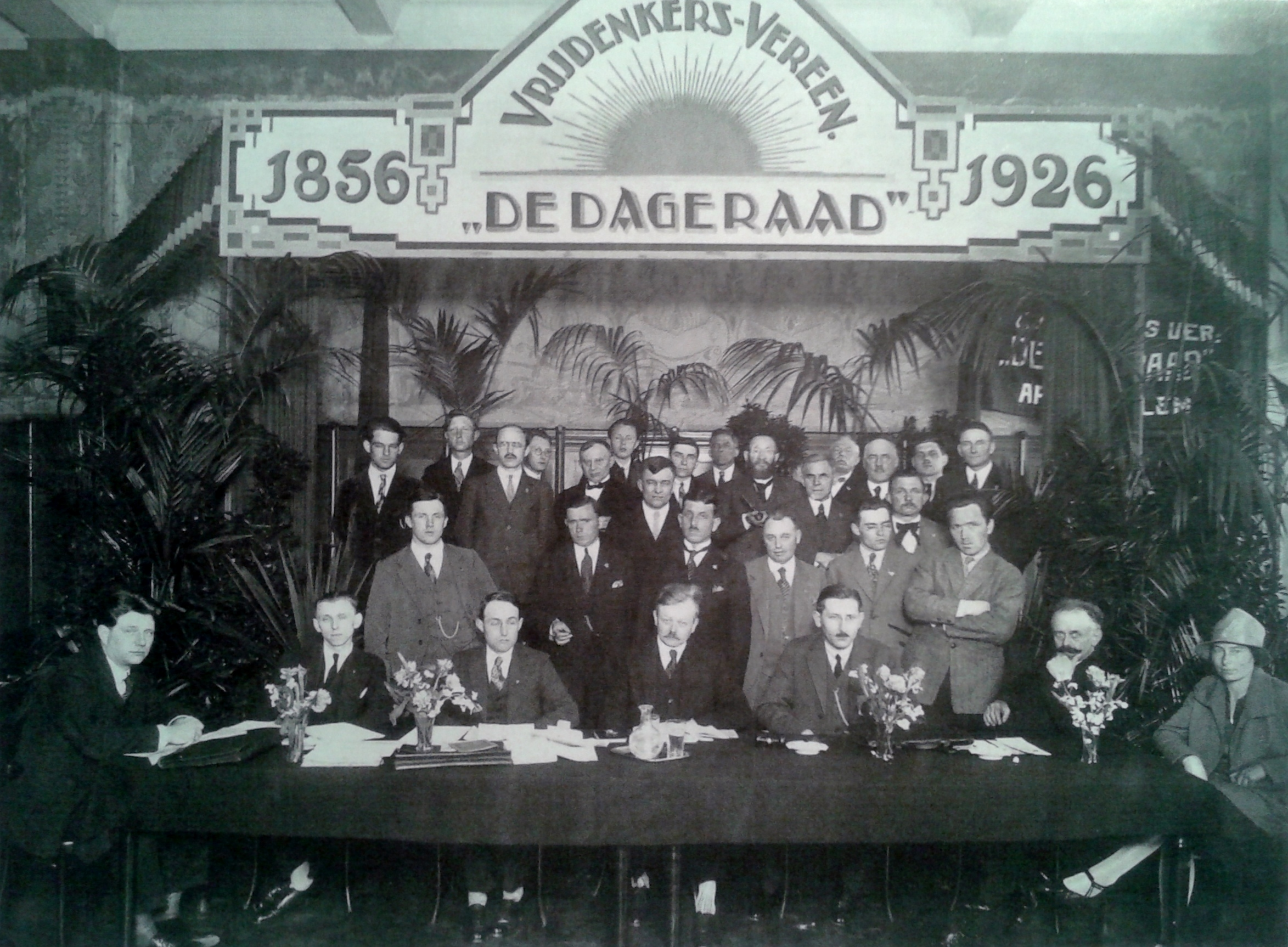 Groepsportret van het bestuur van Vrijdenkersvereniging De Dageraad bij de viering van het zeventigjarig bestaan in Haarlem. Zittend van links naar rechts, beginnend bij de derde: C.F. Everts, Jan Hoving, Veldkamp, Bruynestein; staand, midden tussen Veldkamp en Bruynestein: Willem Havers.